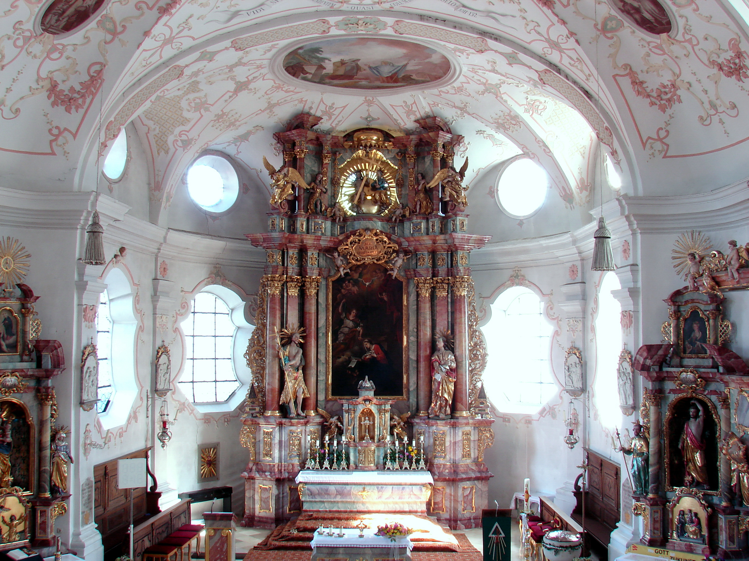 St. Johann Baptist ist die katholische Stadtpfarrkirche von Riedenburg.